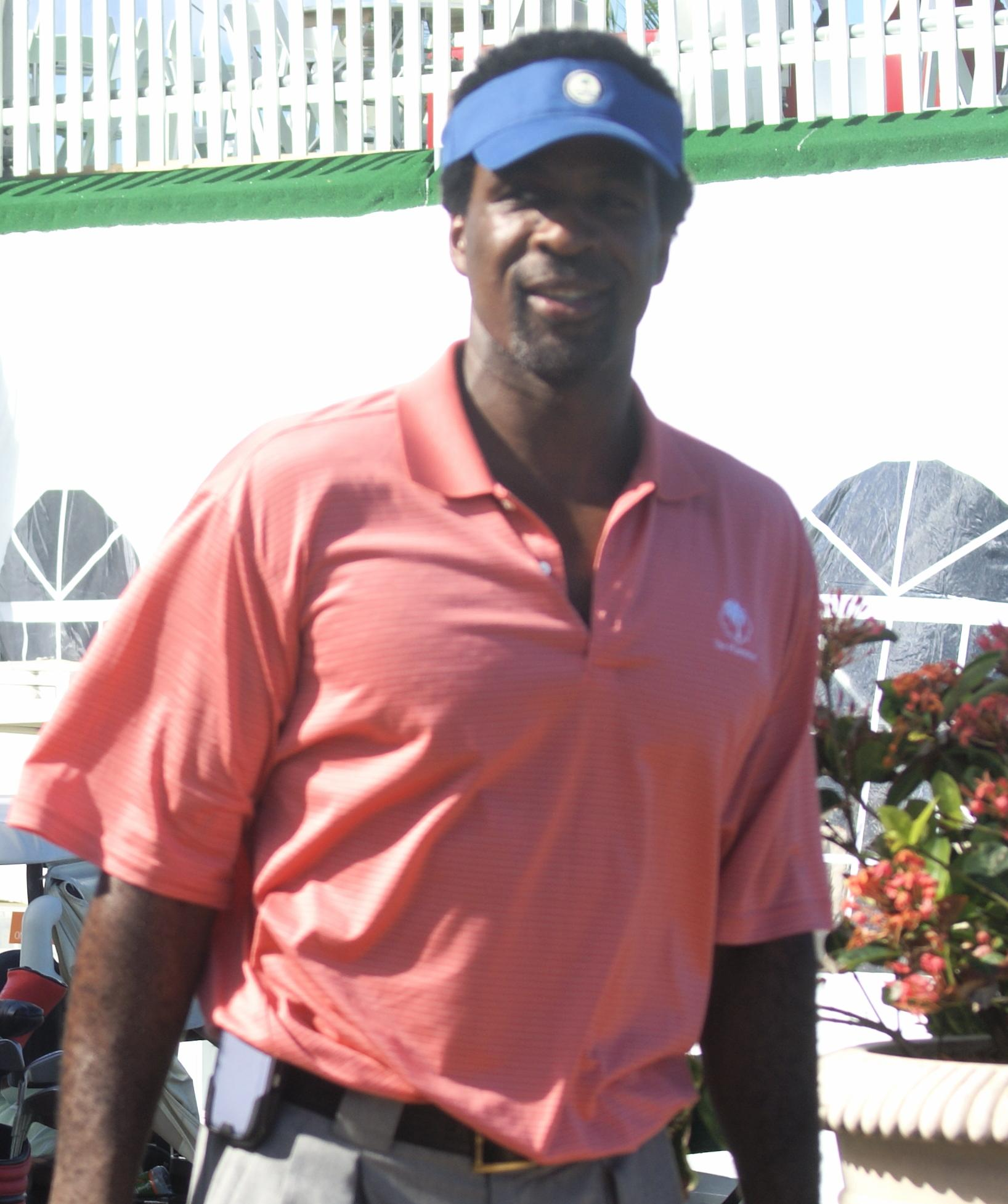 Charles Oakley in 2007.